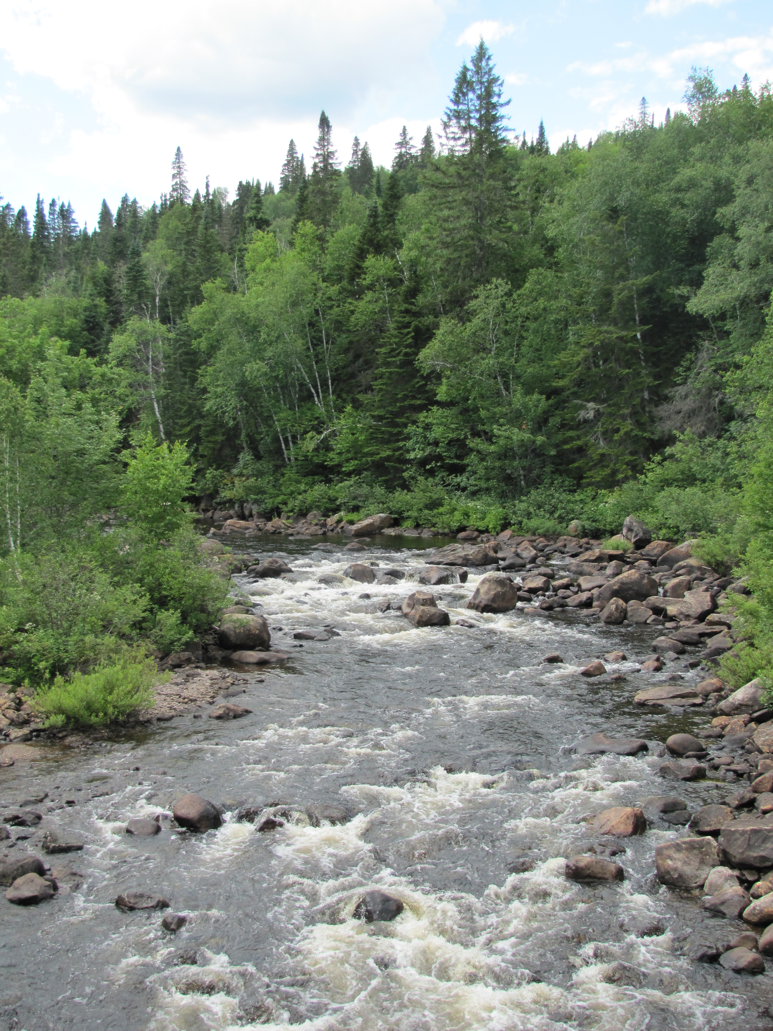 Rivière Sault-Aux-Moutons, Bassin versant de la rivière Sault-Aux-Moutons, Haute-Côte-Nord, Québec, Canada.